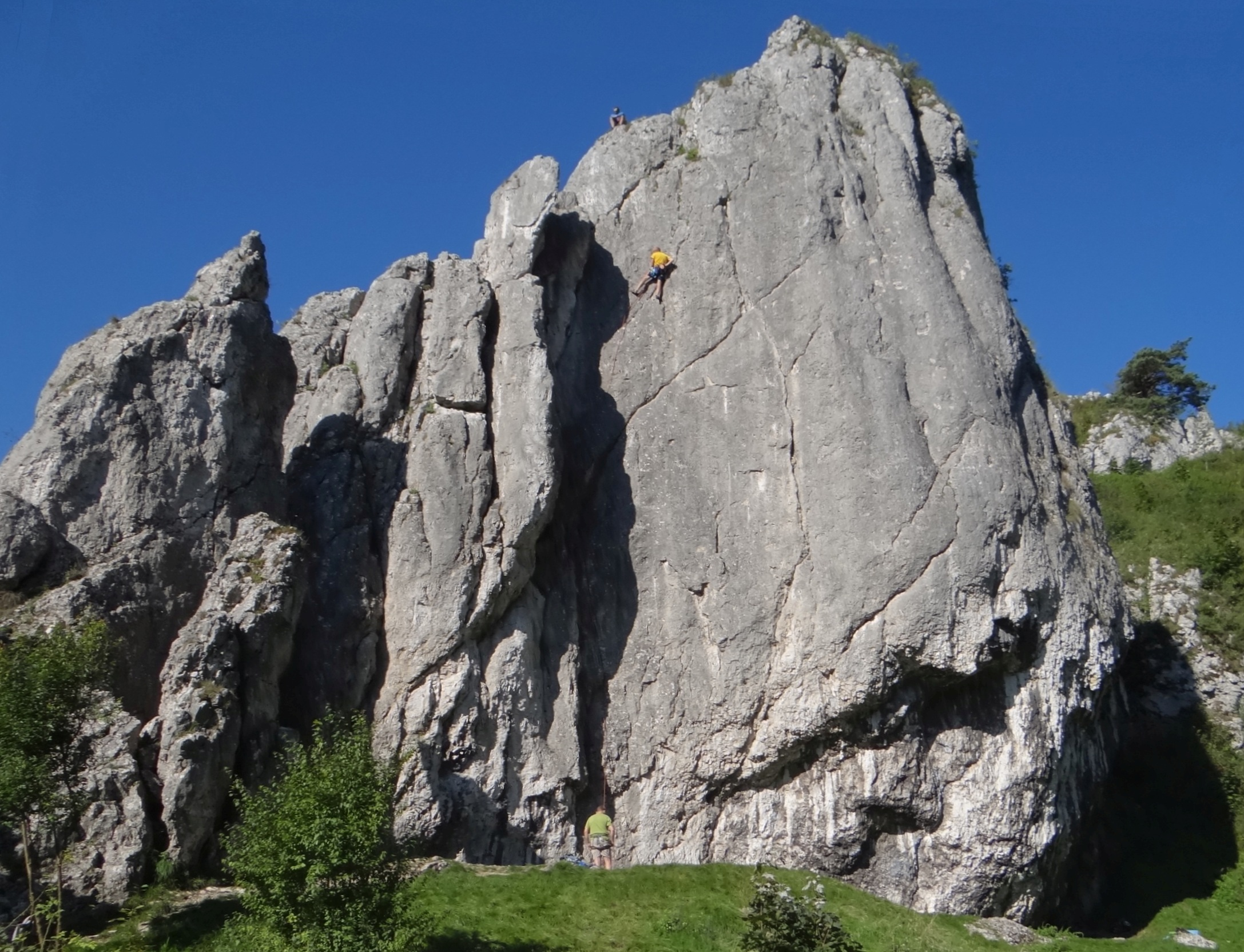 Mur Pokutników